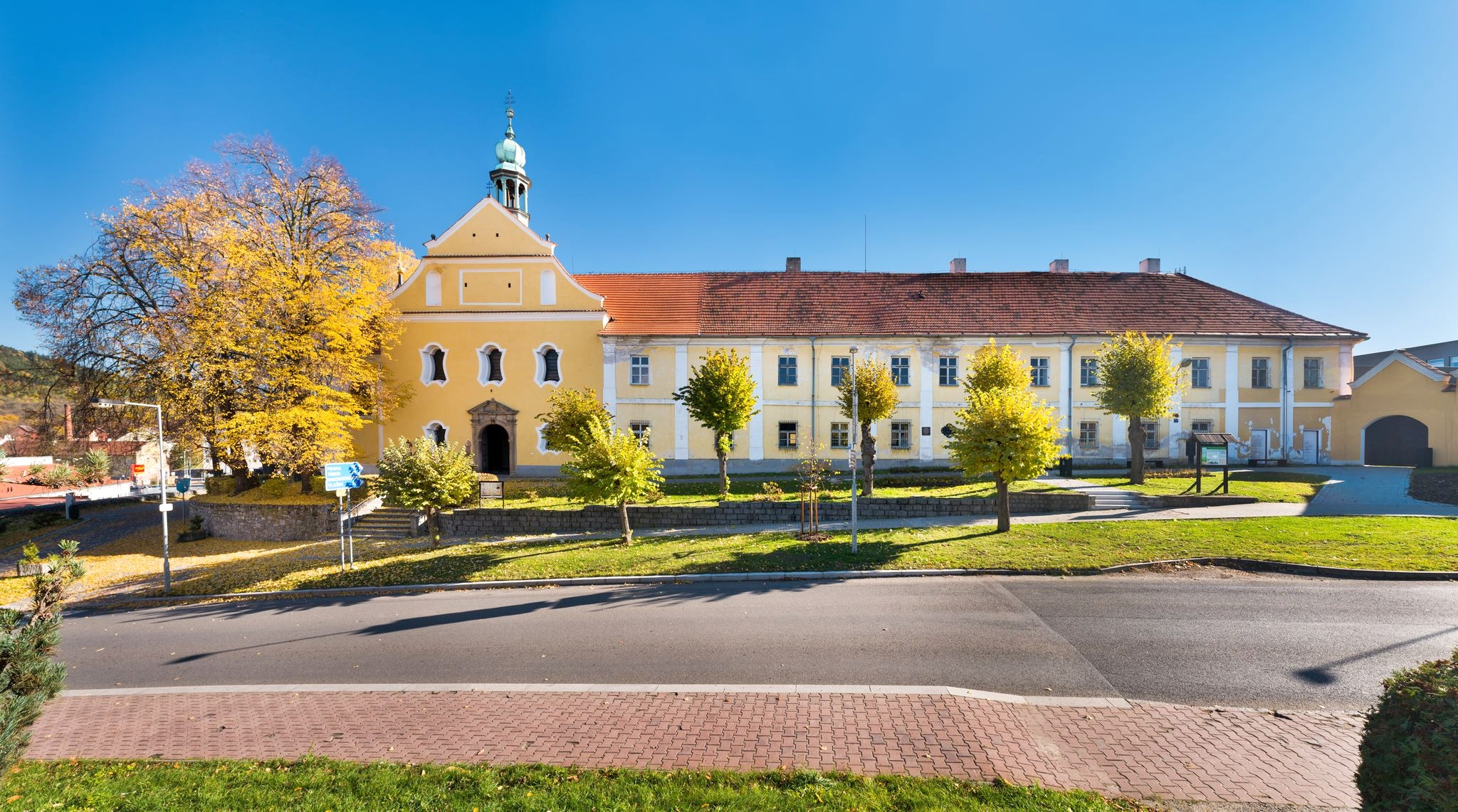 Františkánský klášter ve Voticích